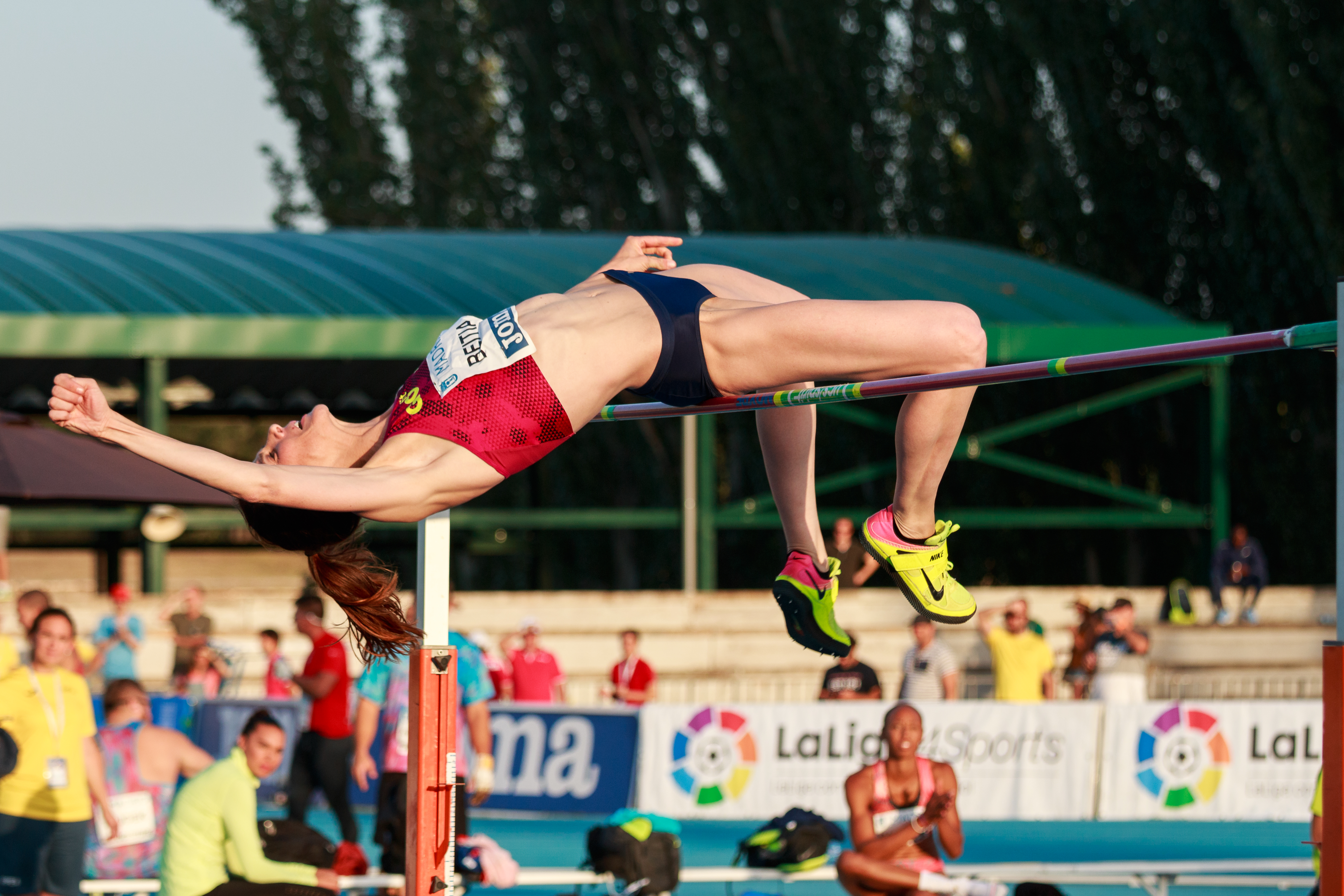 Ruth Beitia (ESP). Salto en alto. IAAF World Challenge. Meeting Madrid 2017. Moratalaz, Madrid.